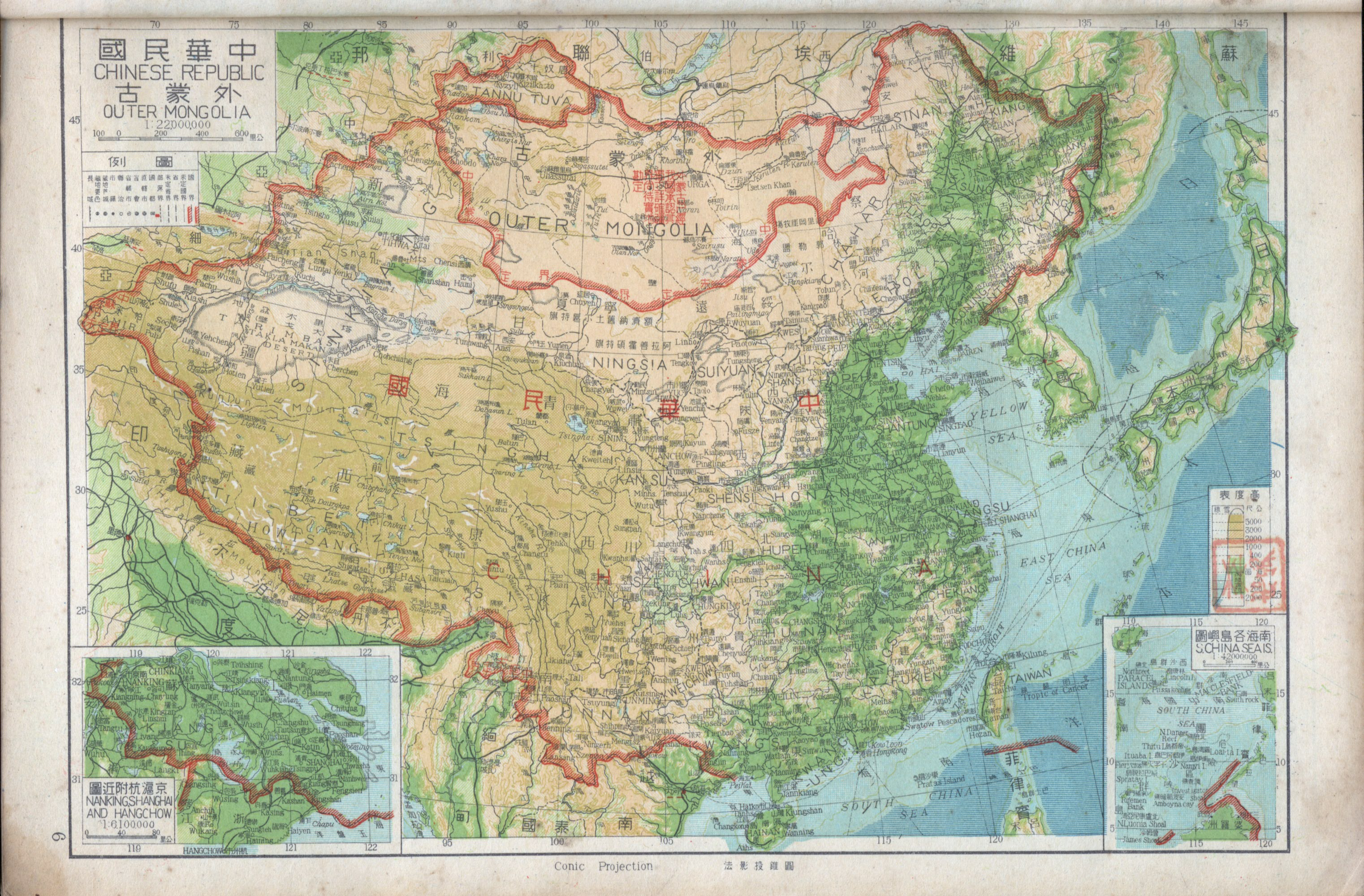 1947年出版的中华民国地图和外蒙古地图。图中的南海诸岛的名称仍使用旧称。1947年中华民国地图，此图中注明外蒙古已经被民国政府批准独立。此图中南海四沙仍然沿用旧名。